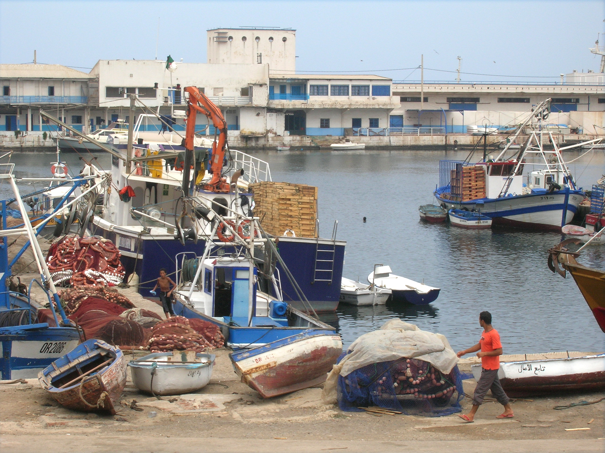 Oran : la pêcherie